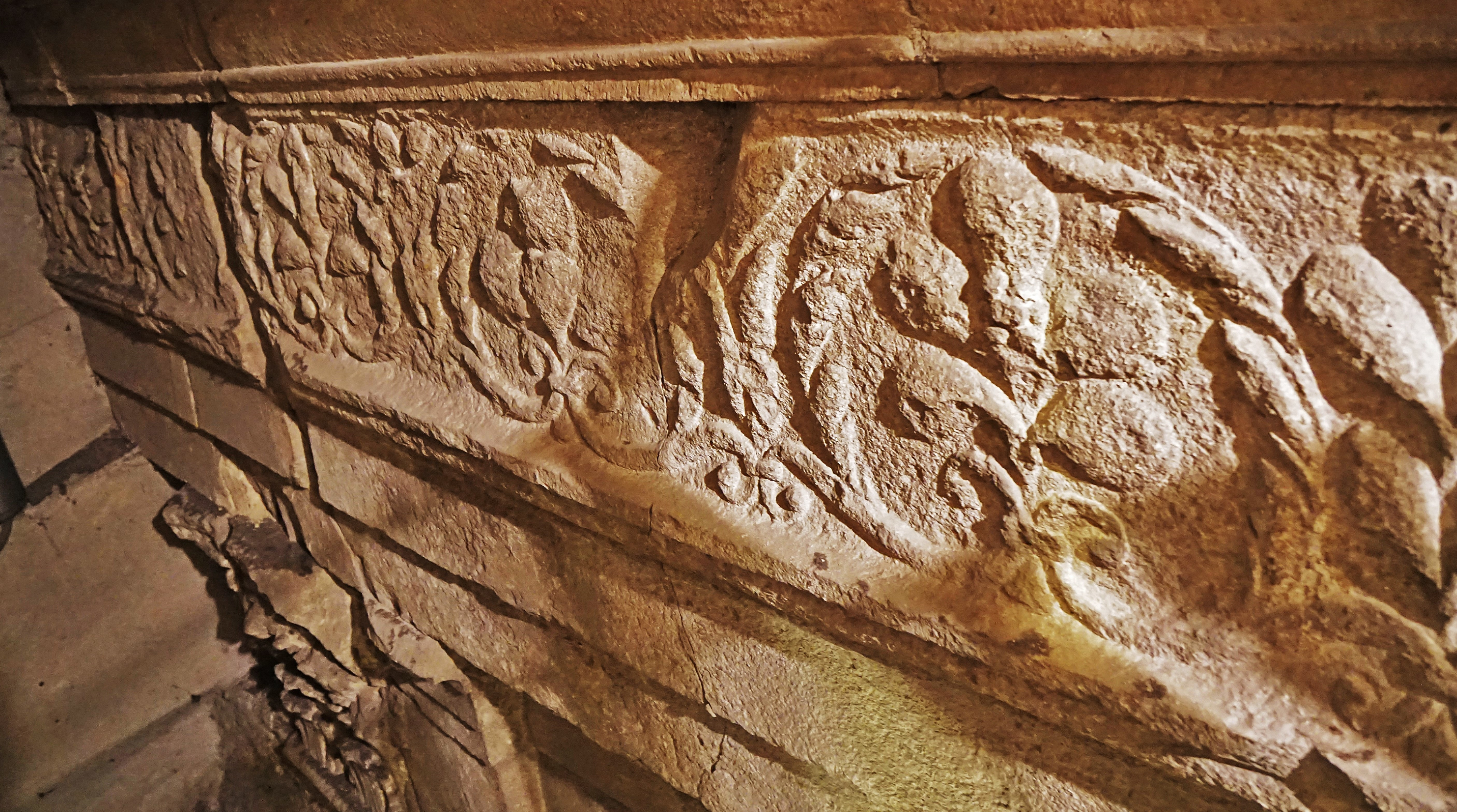 Kathedrale San Giusto (Triest), romanischer Mauerfries